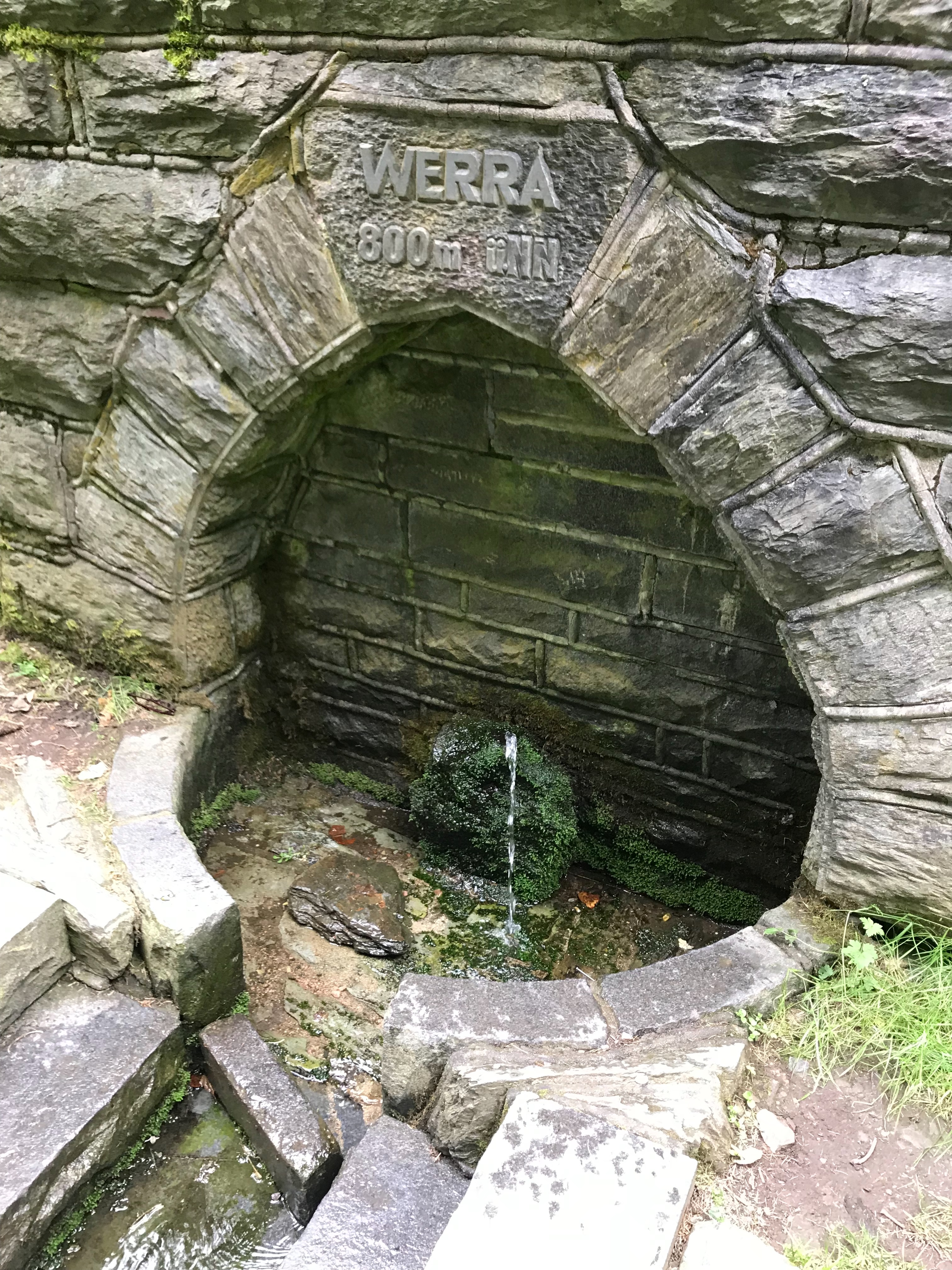 Die zweite Werraquelle bei Siegmundsburg.